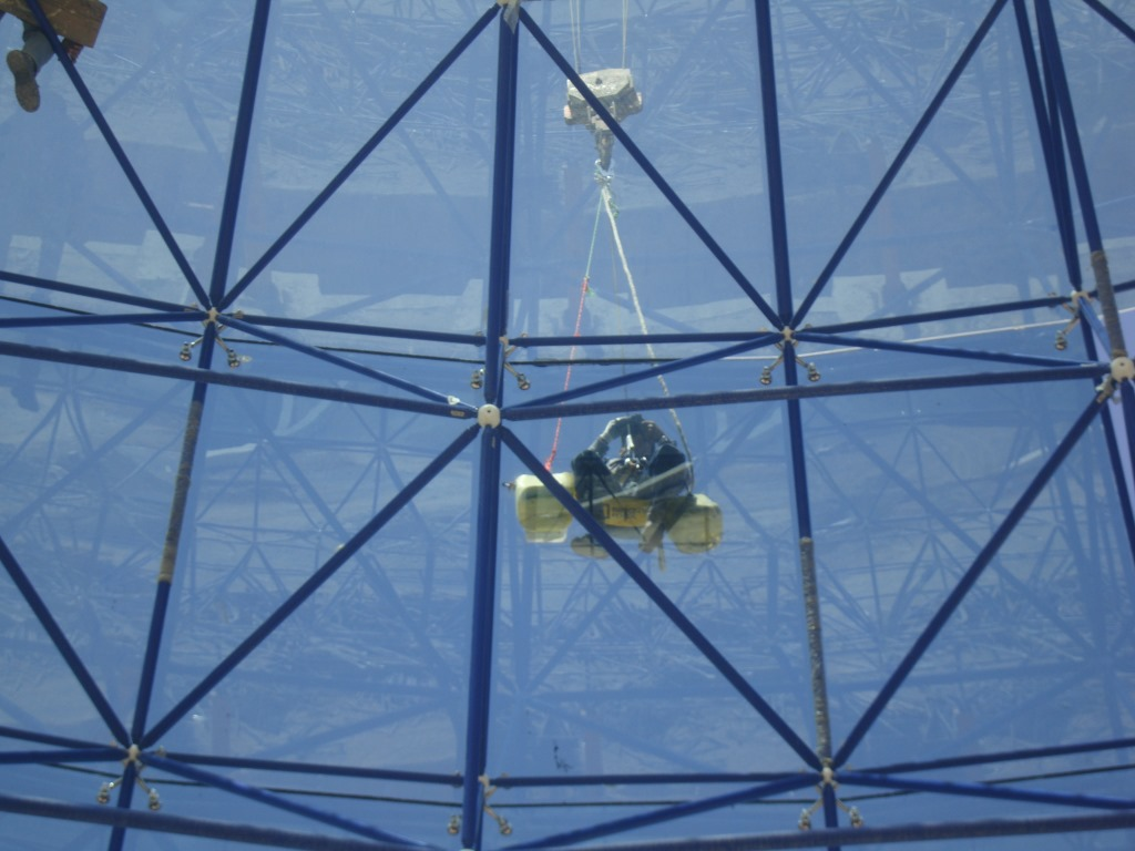 پوسته شیشه ای نصب شده در پارک آب و آتش با دیتایل اسپیس فریم